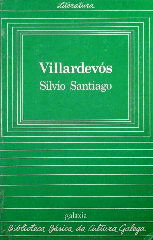 Biblioteca Básica da Cultura Galega, 40, Vilardevós, Silvio Santiago.jpg